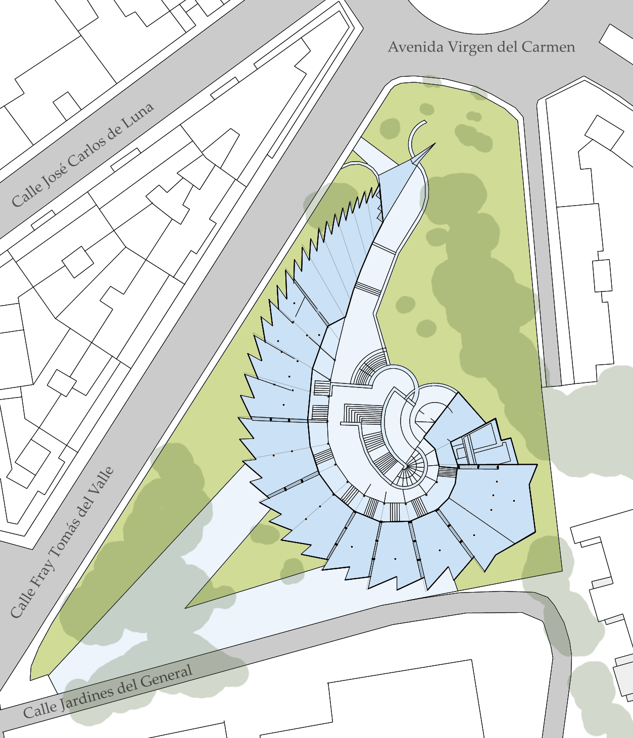 Plano situación del edificio de la escuela de Artes y Oficios de Algeciras, Andalucía, España